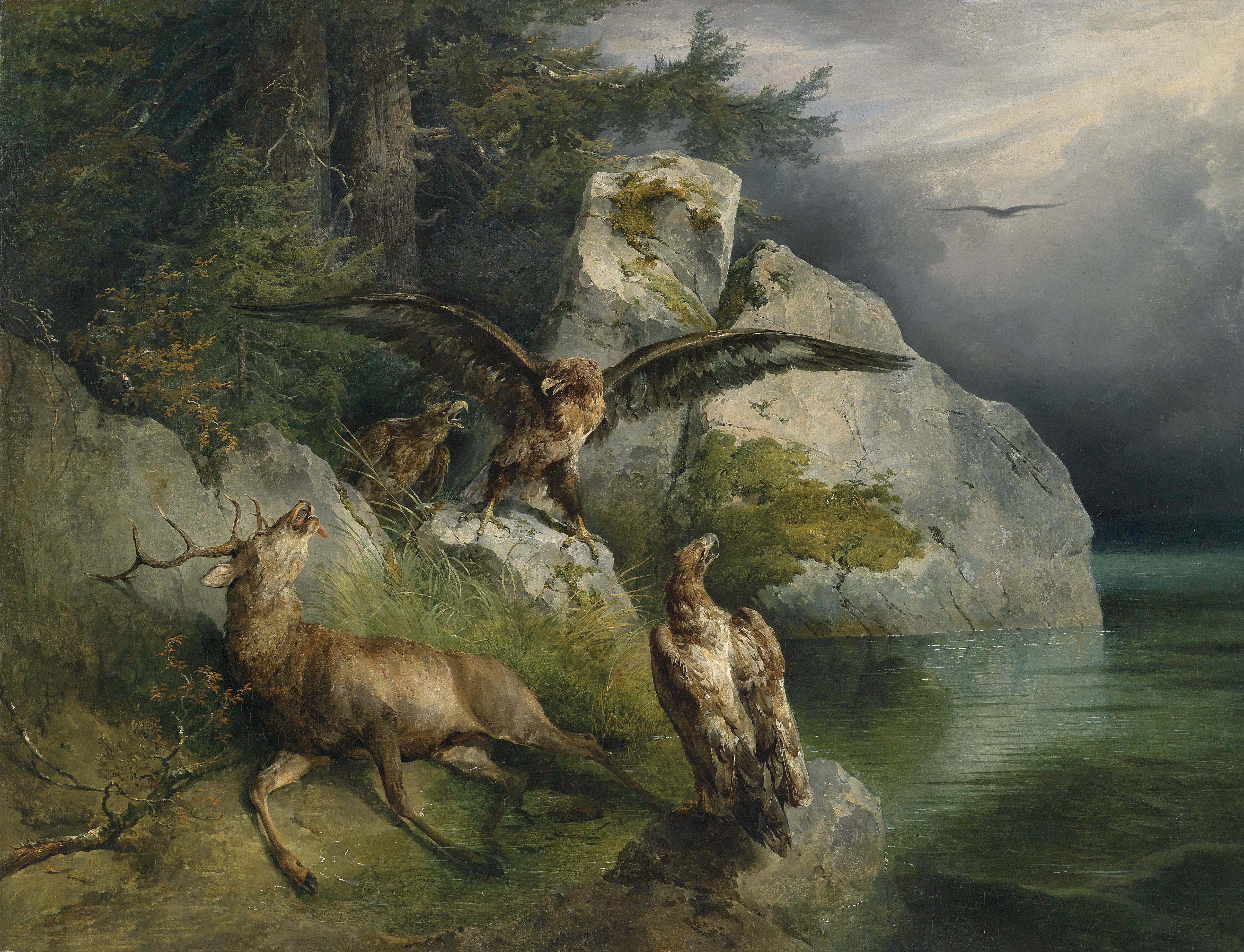 Adler und sterbender Hirsch am Seeufer